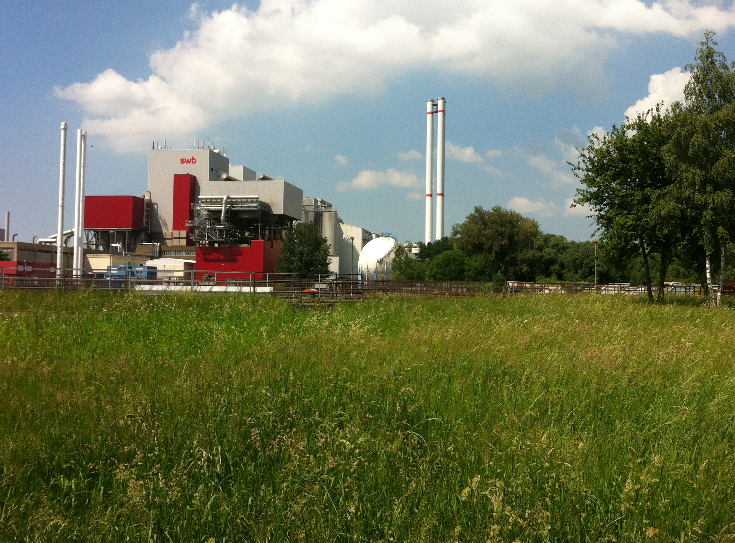 Müllverbrennungsanlage in der Stadt Bremen